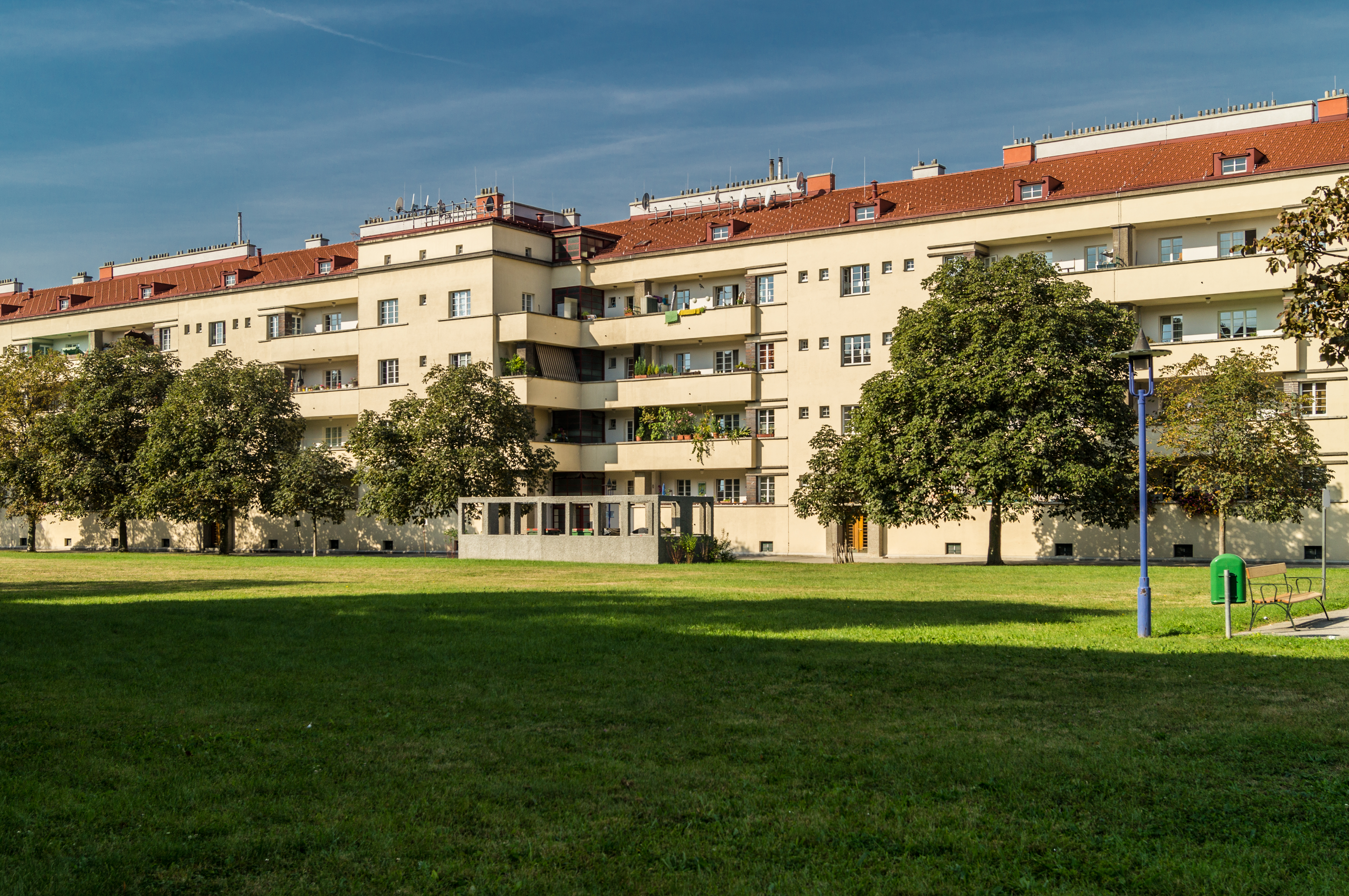 Karl-Marx-Hof Karl-Marx-Hof Innenansicht Hof 4 This media shows the Vienna residential building (Gemeindebau) with the ID 220.